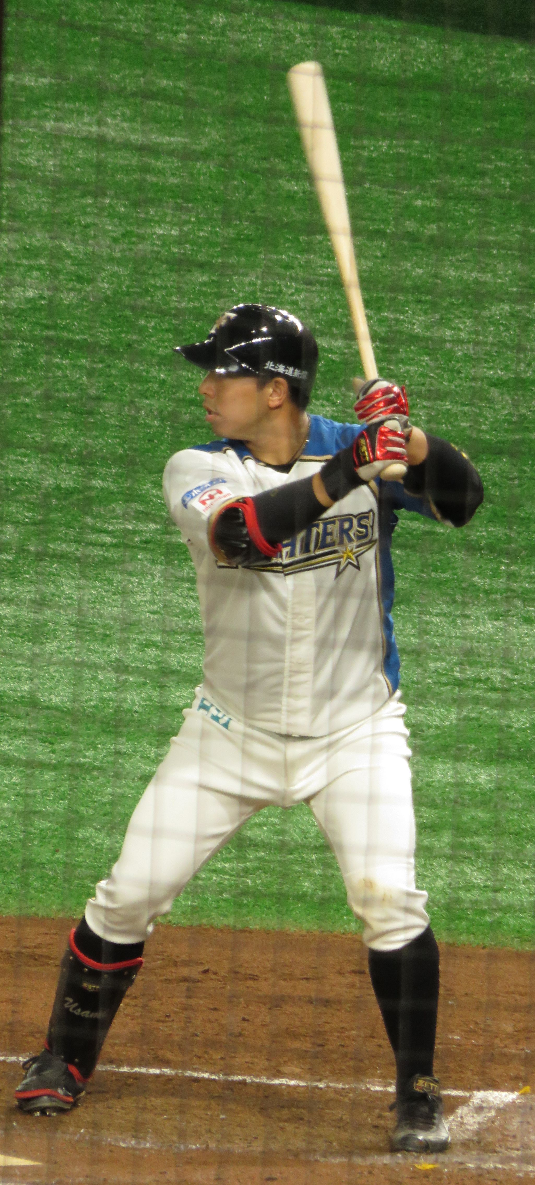 北海道日本ハムファイターズの宇佐見真吾選手